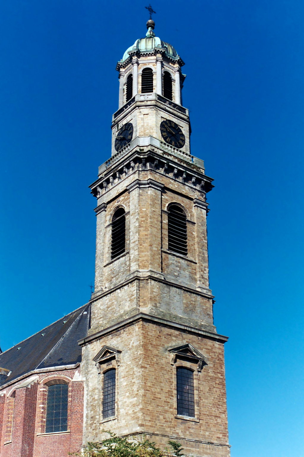 Belgique - Brabant flamand - Abbaye de Ninove - tour néoclassique de Louis Roelandt